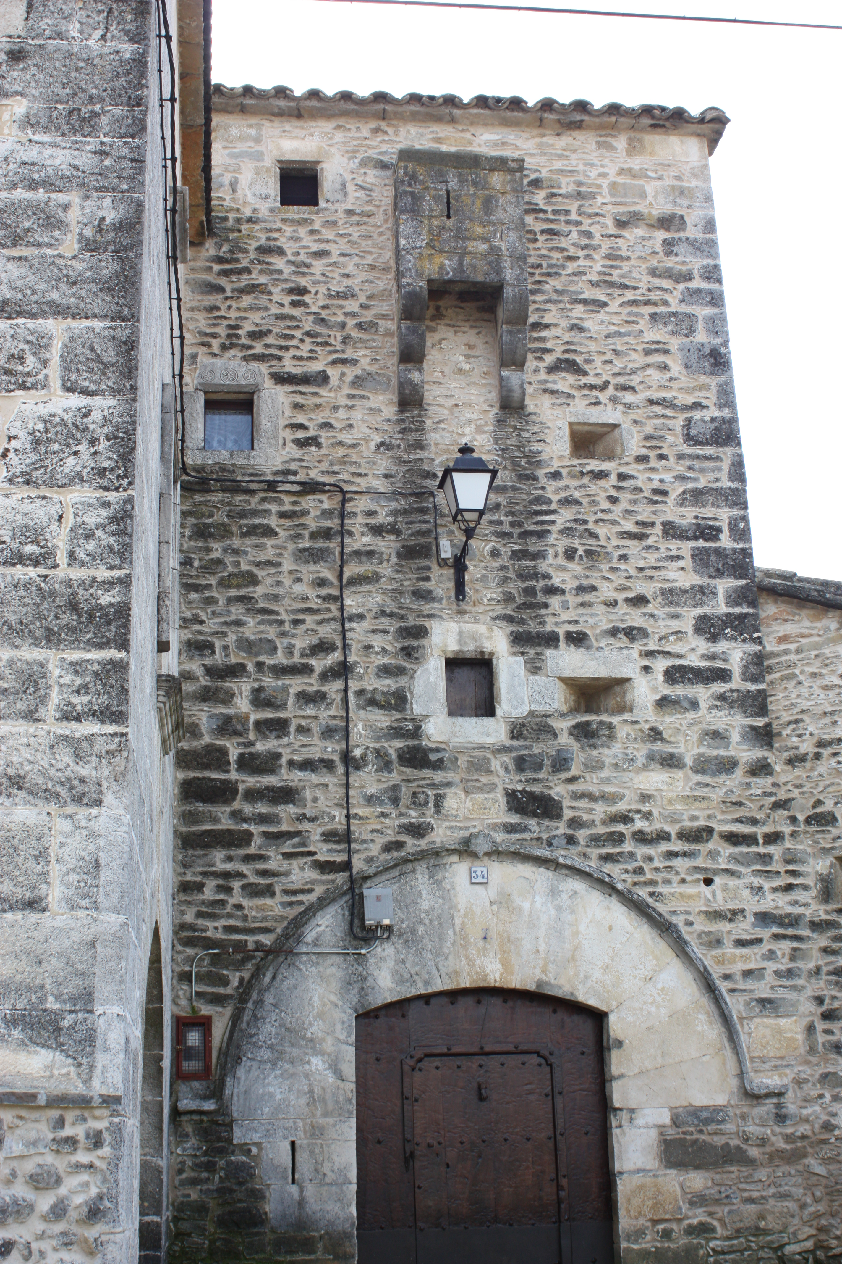 Fachada principal de casa Carruesco con matacán sobre la puerta principal